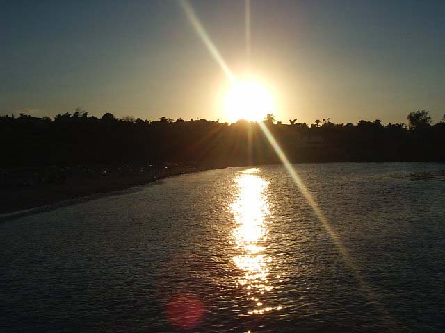 Destello.